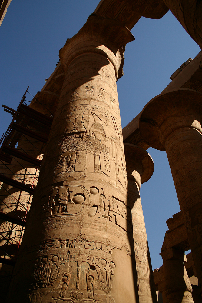 Karnak